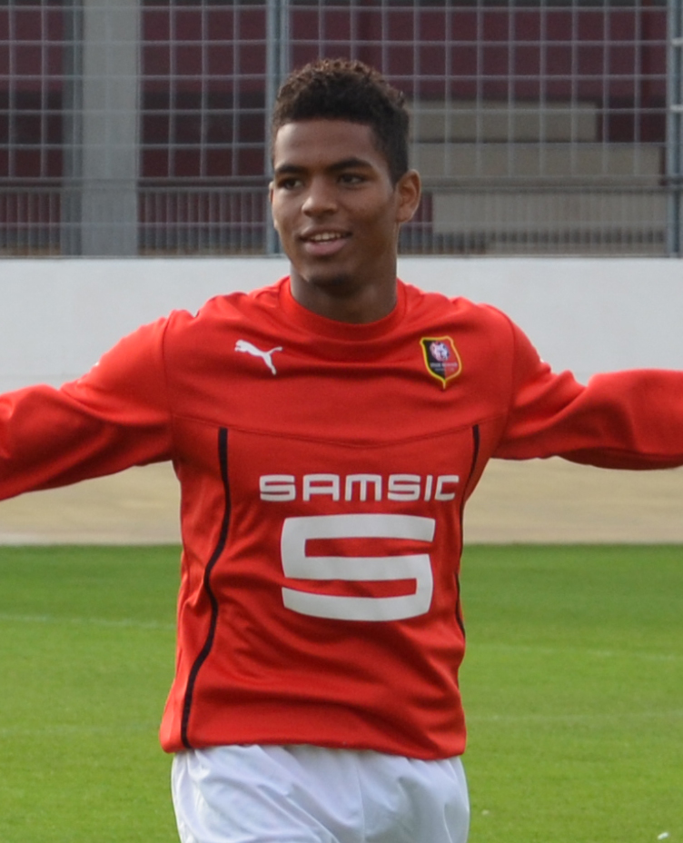 Photographie d'Ambroise Gboho lors de l'échauffement d'un match amical opposant la réserve du Stade rennais à celle du Stade Malherbe de Caen le 28 septembre 2013 au stade de Venoix, à Caen.